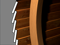 poszycie klinkierowe -przekrój